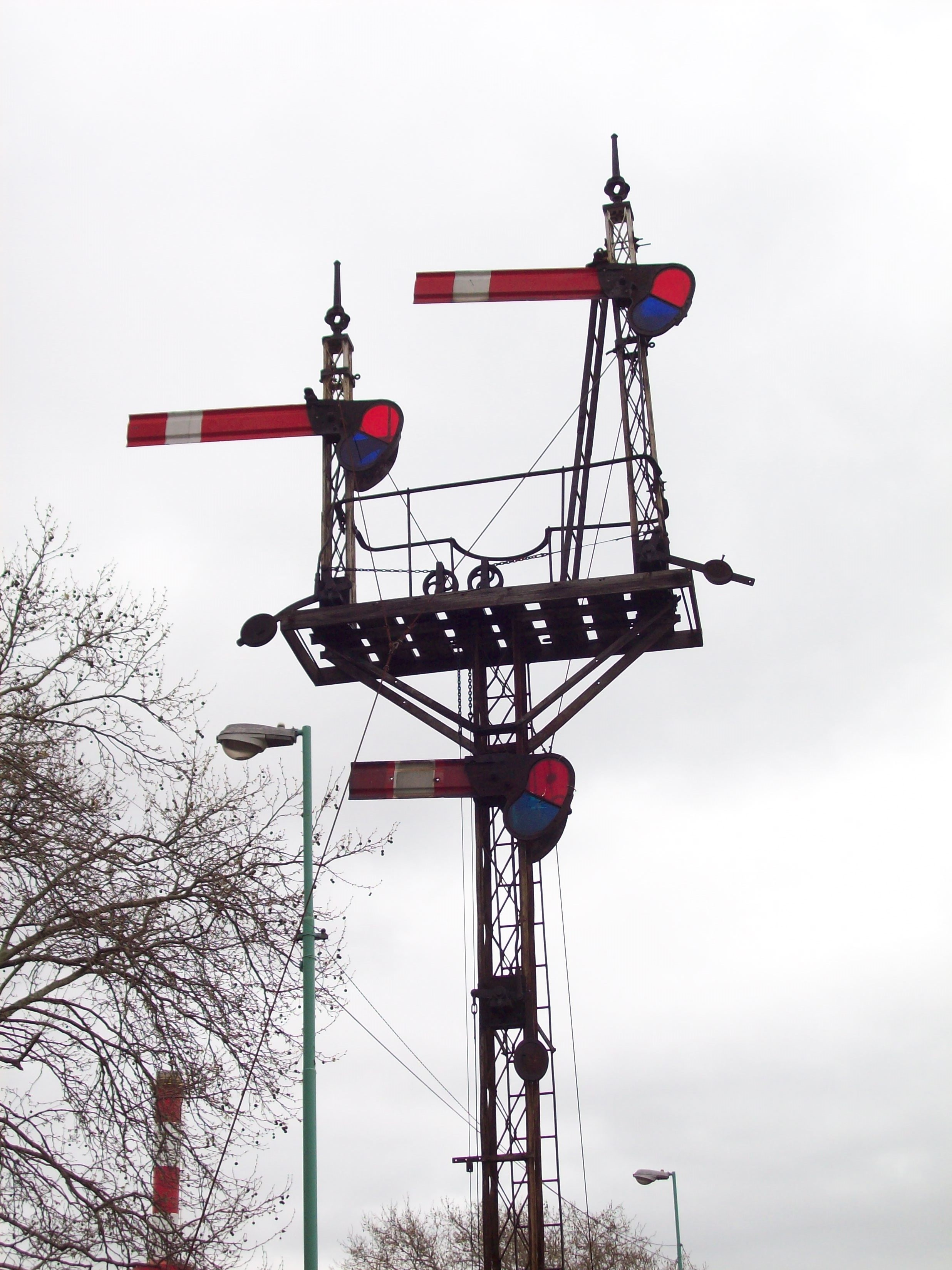 Señales a la entrada de Berazategui mirando hacia Constitución cara visible. La señal de llamada (la de brazo pequeño abajo) no se utiliza.